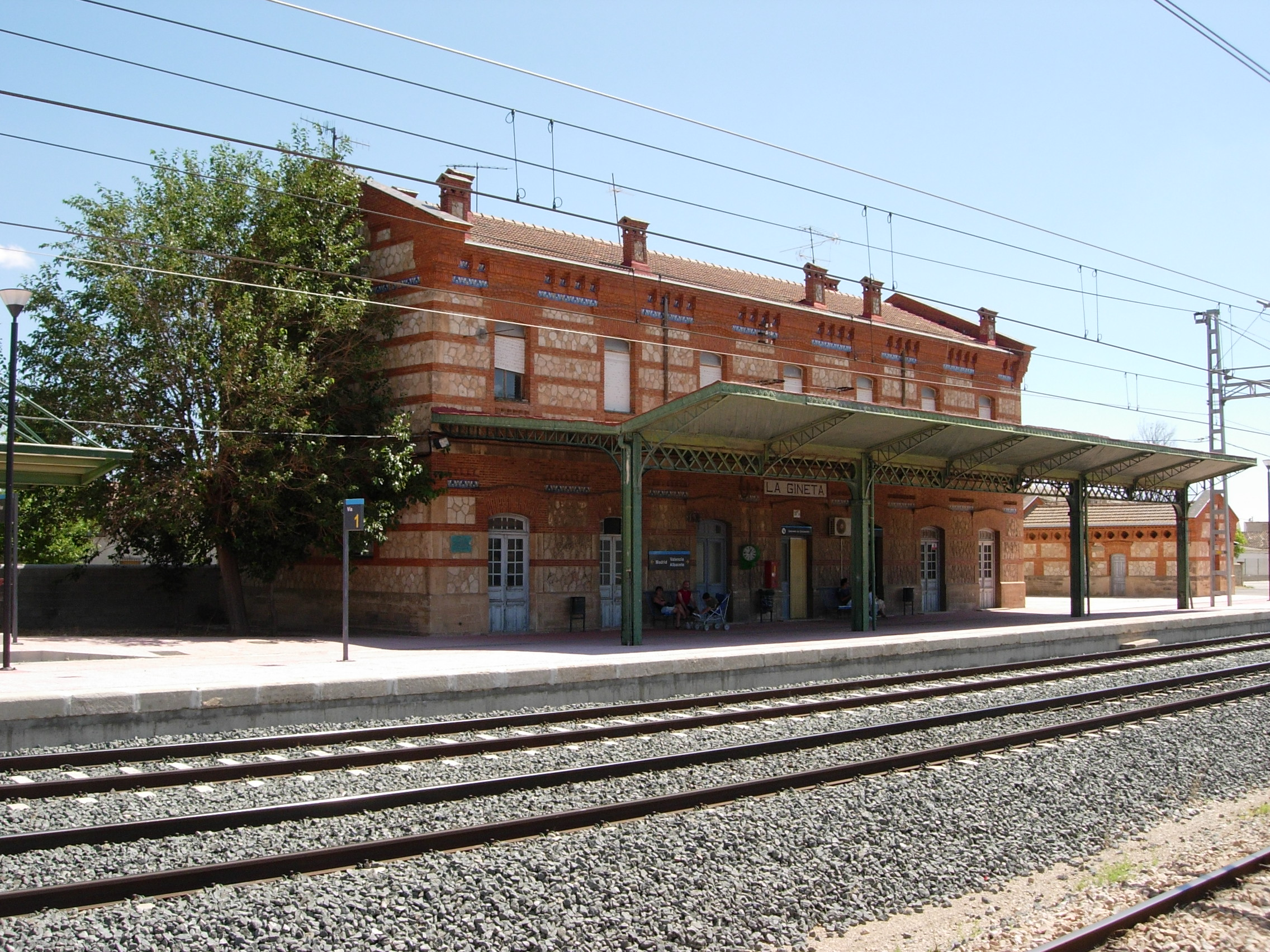 Vista de la estación del ferrocarril de La Gineta (provincia de Albacete, España).